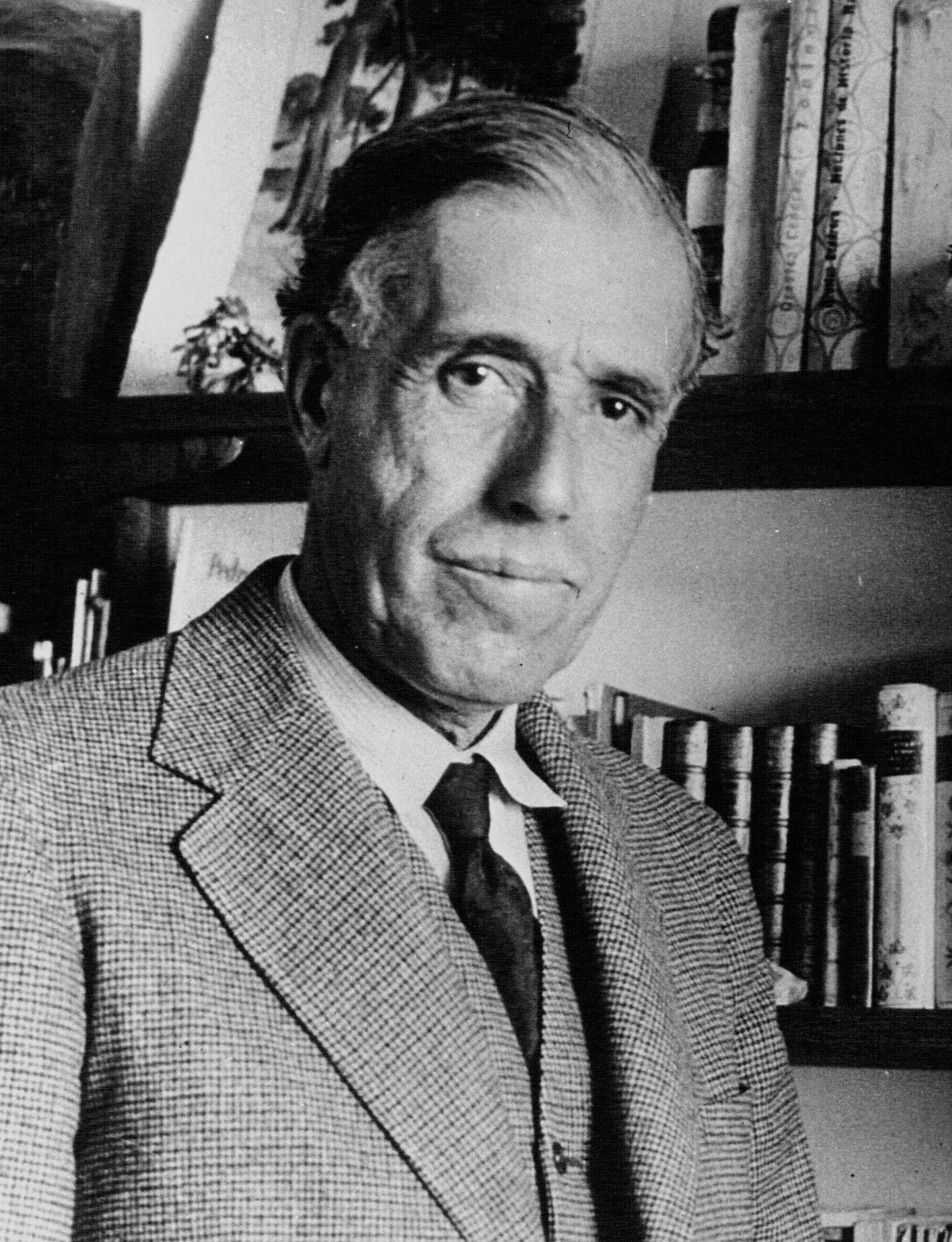 Julián Besteiro